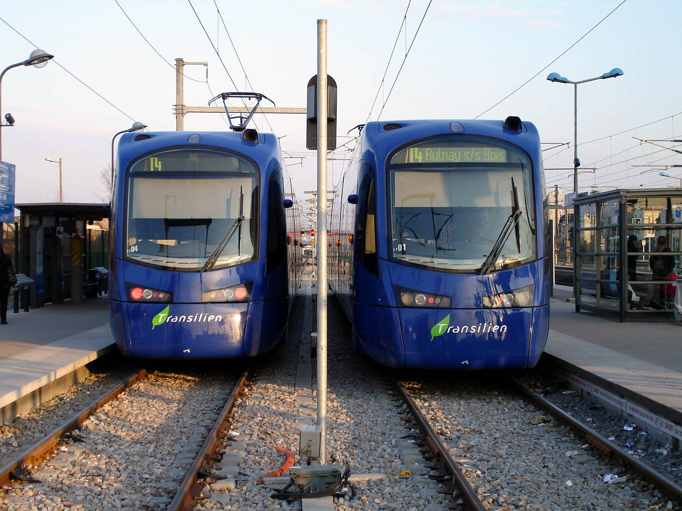 Gare de Bondy (Seine-Saint-Denis), France